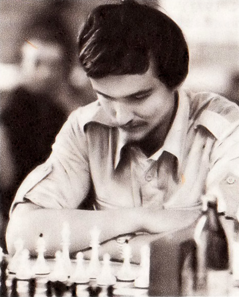 Adam Kuligowski (ur. 24 grudnia 1955 w Warszawie) – polski szachista, arcymistrz, złoty medalista olimpijski.